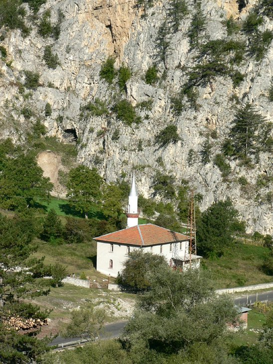 Джамията край село Гьоврен според исторически извори известна още като джамията със златния покрив.